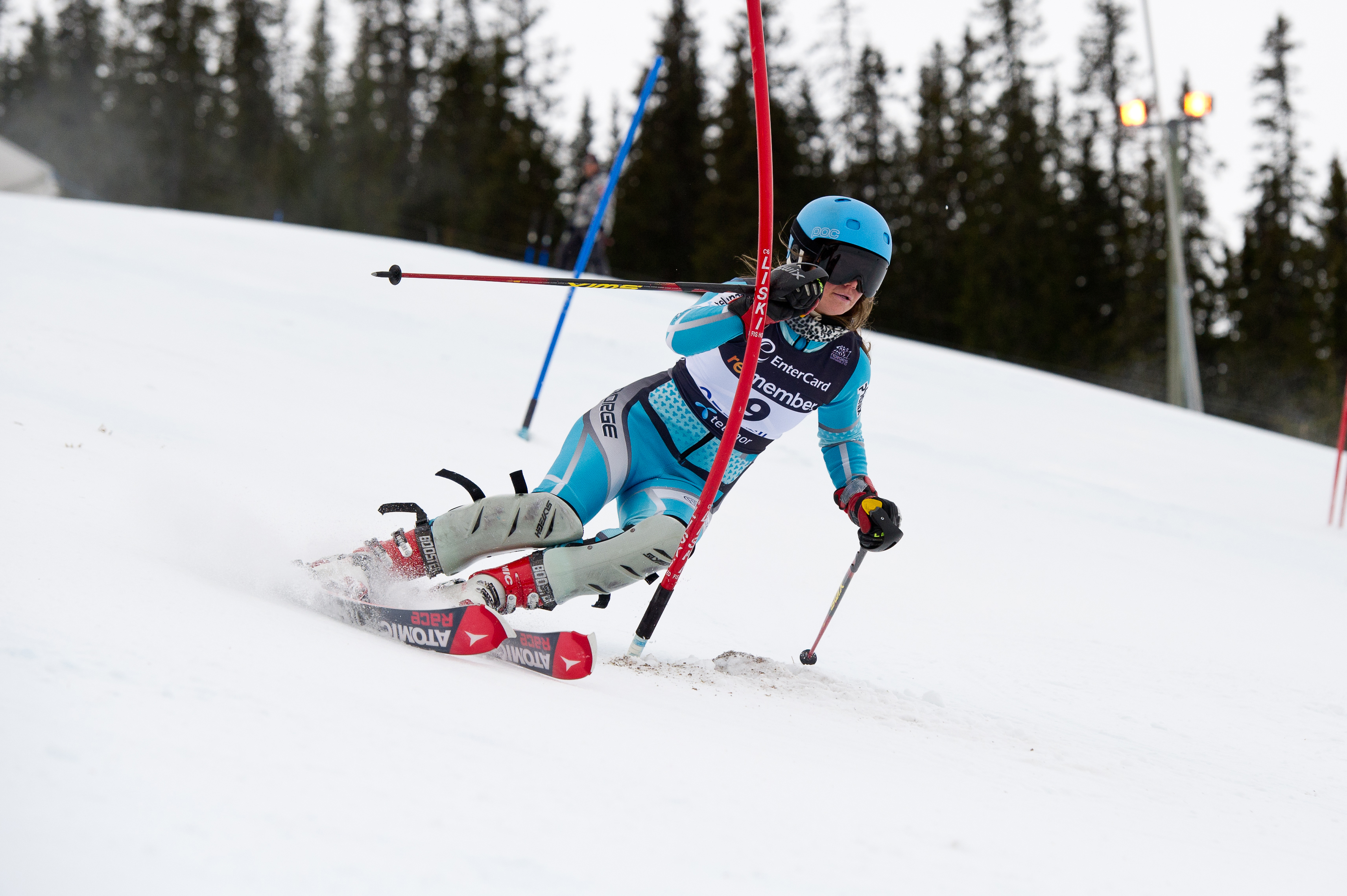 Nr. 7 Elise-Woien Tefre i NM i slalåm i Trysil 27. mars 2011.